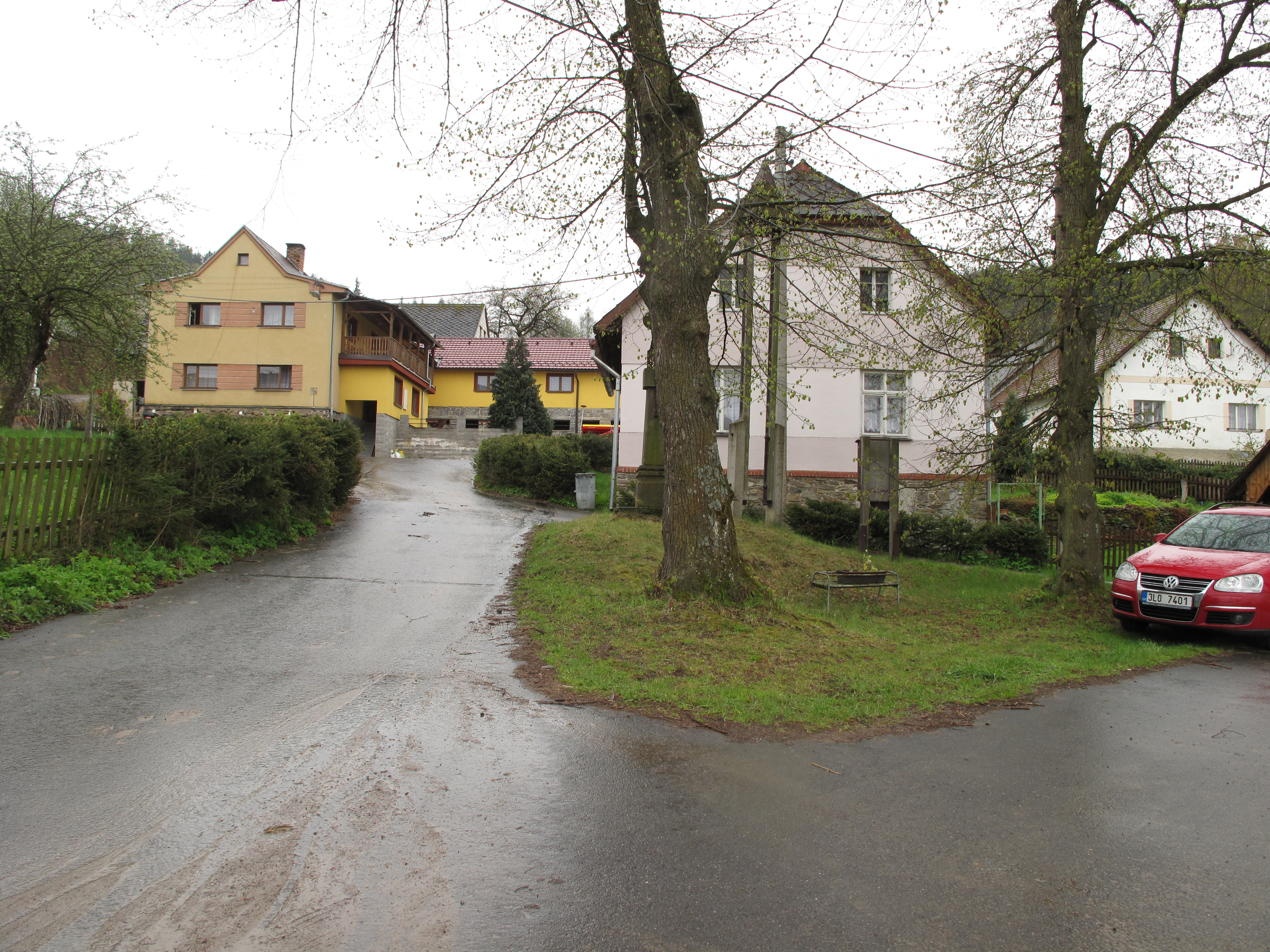 Tvrdoslav. Okres Klatovy, Česká republika.